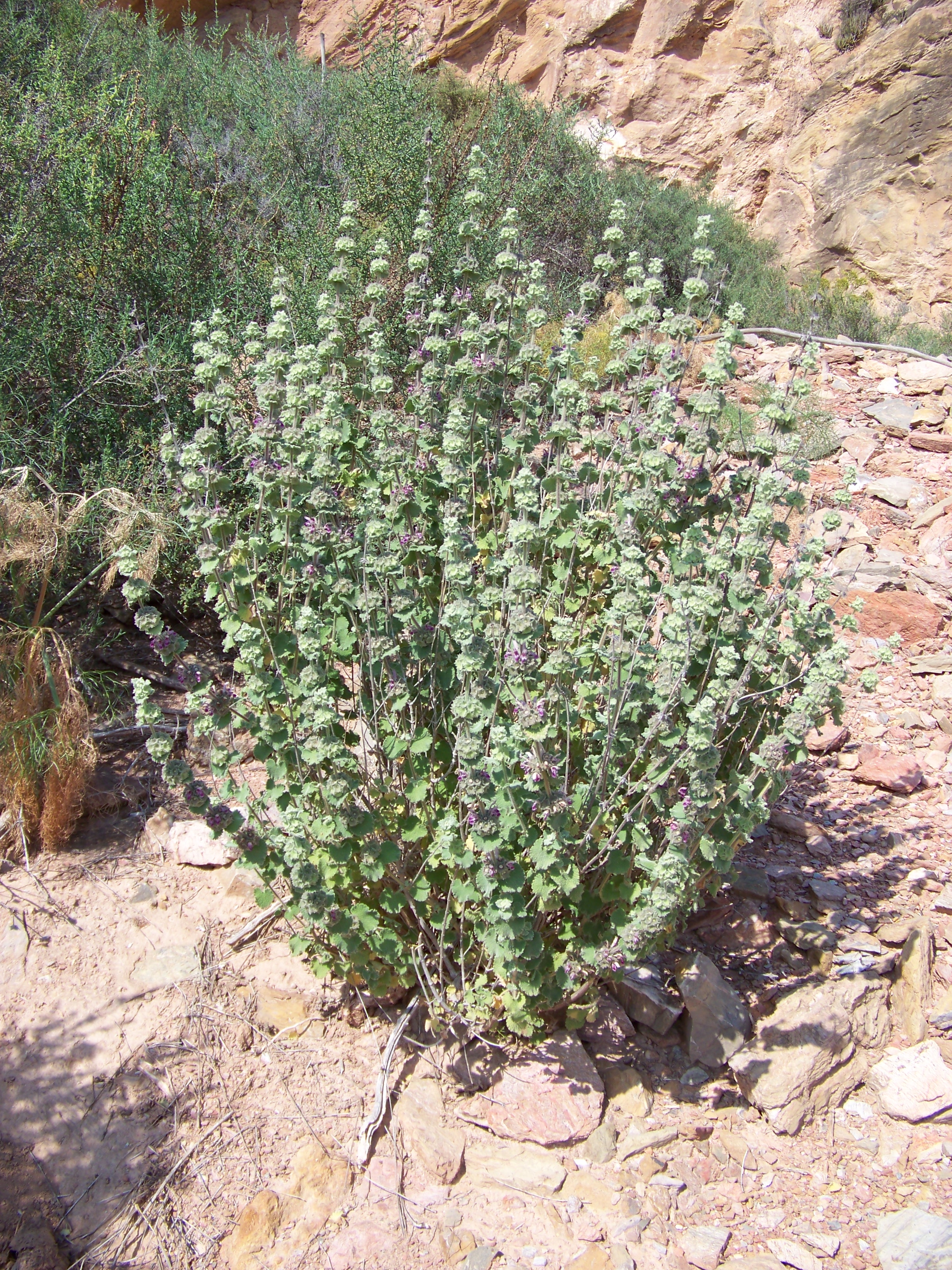 Ballota hirsuta (Manrubio) : aspecto general - Cabezo de los Ojales, Albatera (Alicante, España).